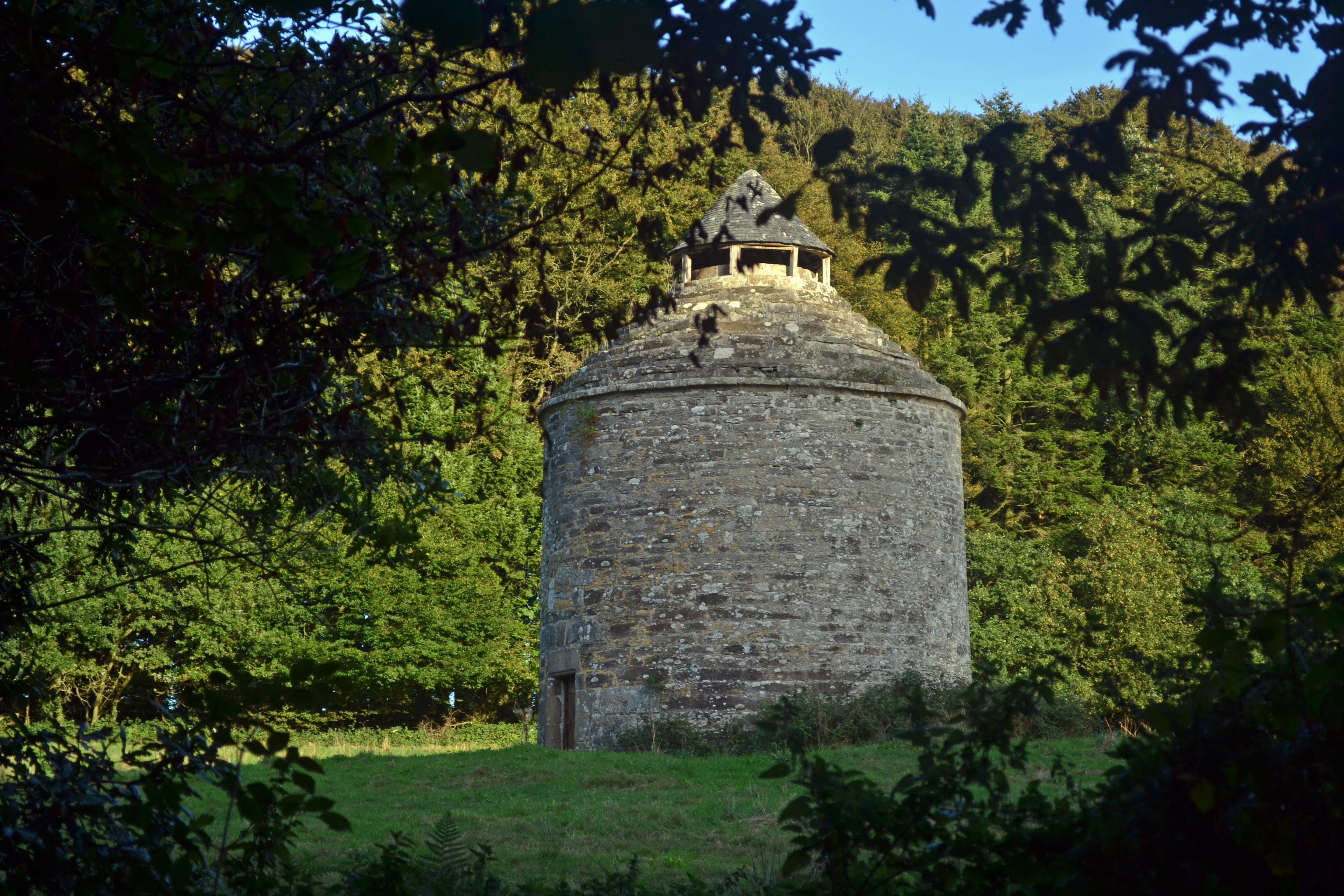 Pigeonnier du château de Troërin (XVIIe et XIXe siècles) à Plouvorn près de Lambader dans le Finistère. .